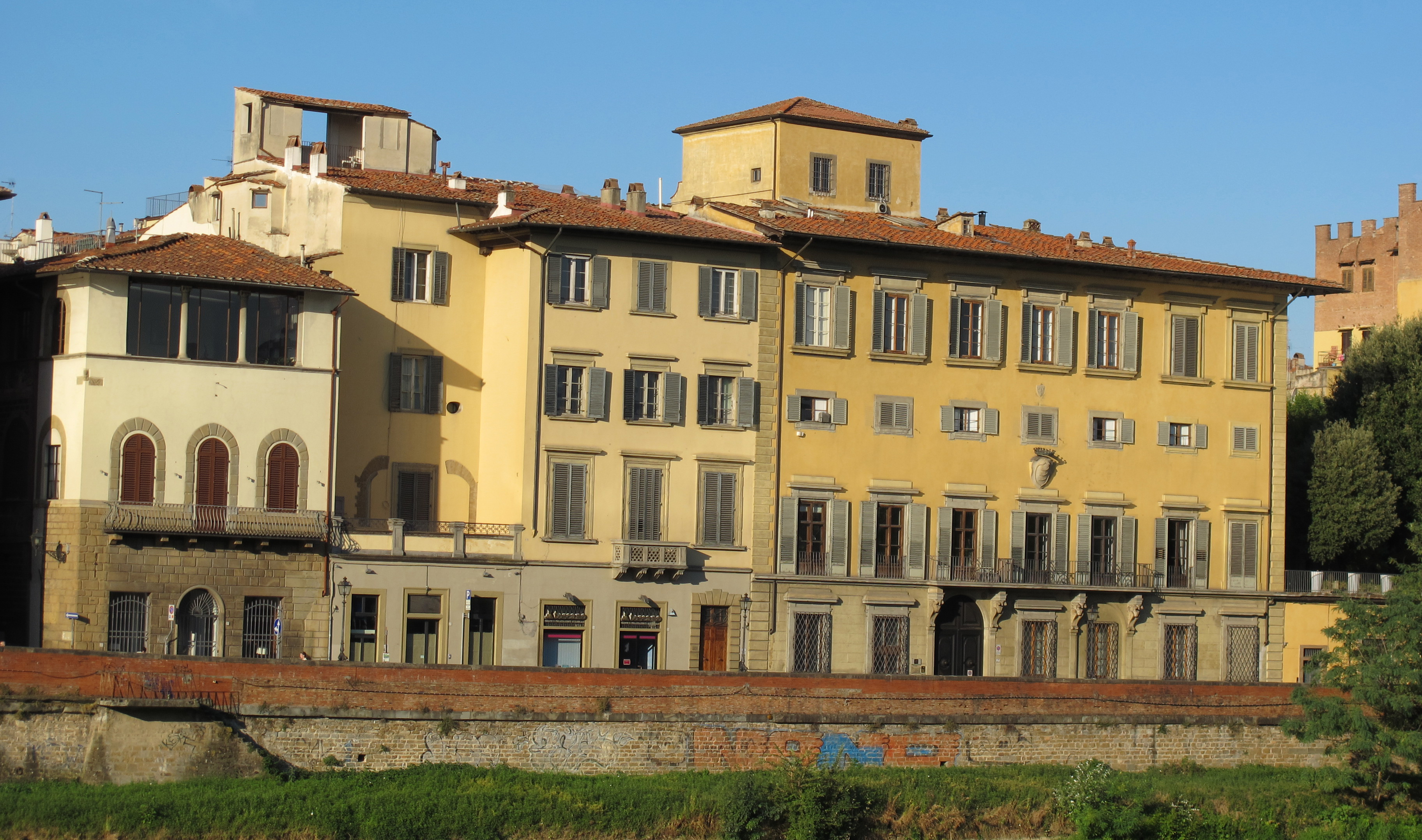 Lungarno Guicciardi, Firenze